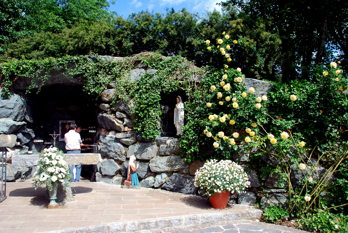 Geistiges, religiöses Highlight von Unterlamm